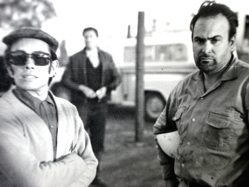 Los pilotos argentinos Jorge Juan Ternengo (de boina y gafas) y Orlando Blas Sotro (casco en mano), en ocasión de disputar una competencia de la Fórmula 1 Mecánica Argentina, en San Antonio, Córdoba, en el año 1966